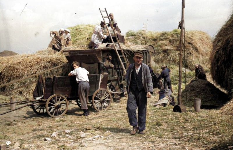 Hönow, Dreschen des Getreides ADN-ZB/Blunck/ Getreideernte in der Gemeinde Hönow bei Berlin 1949. Neubauern beim Dreschen des Getreides.